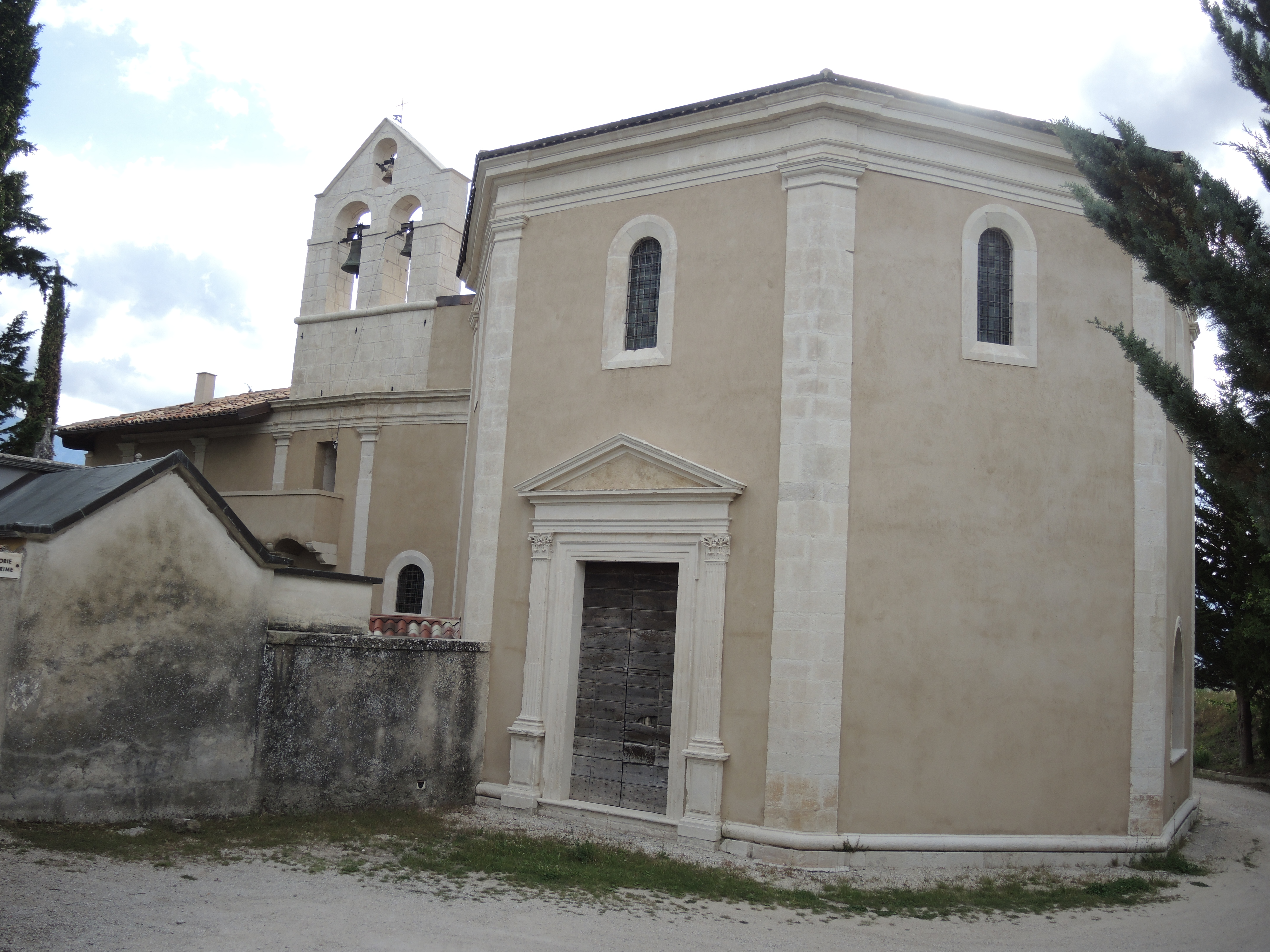 Barisciano - Chiesa di Santa Maria della Consolazione